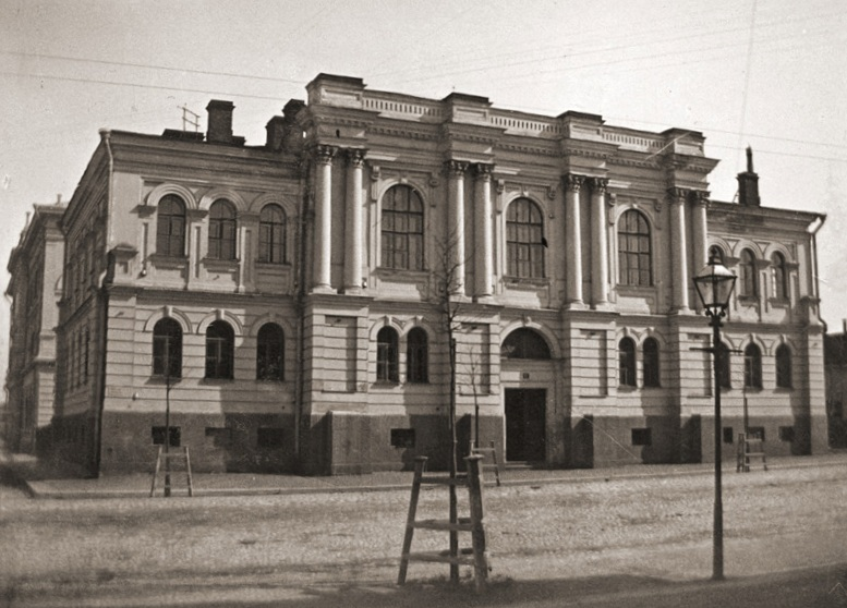 Выборгская народная школа